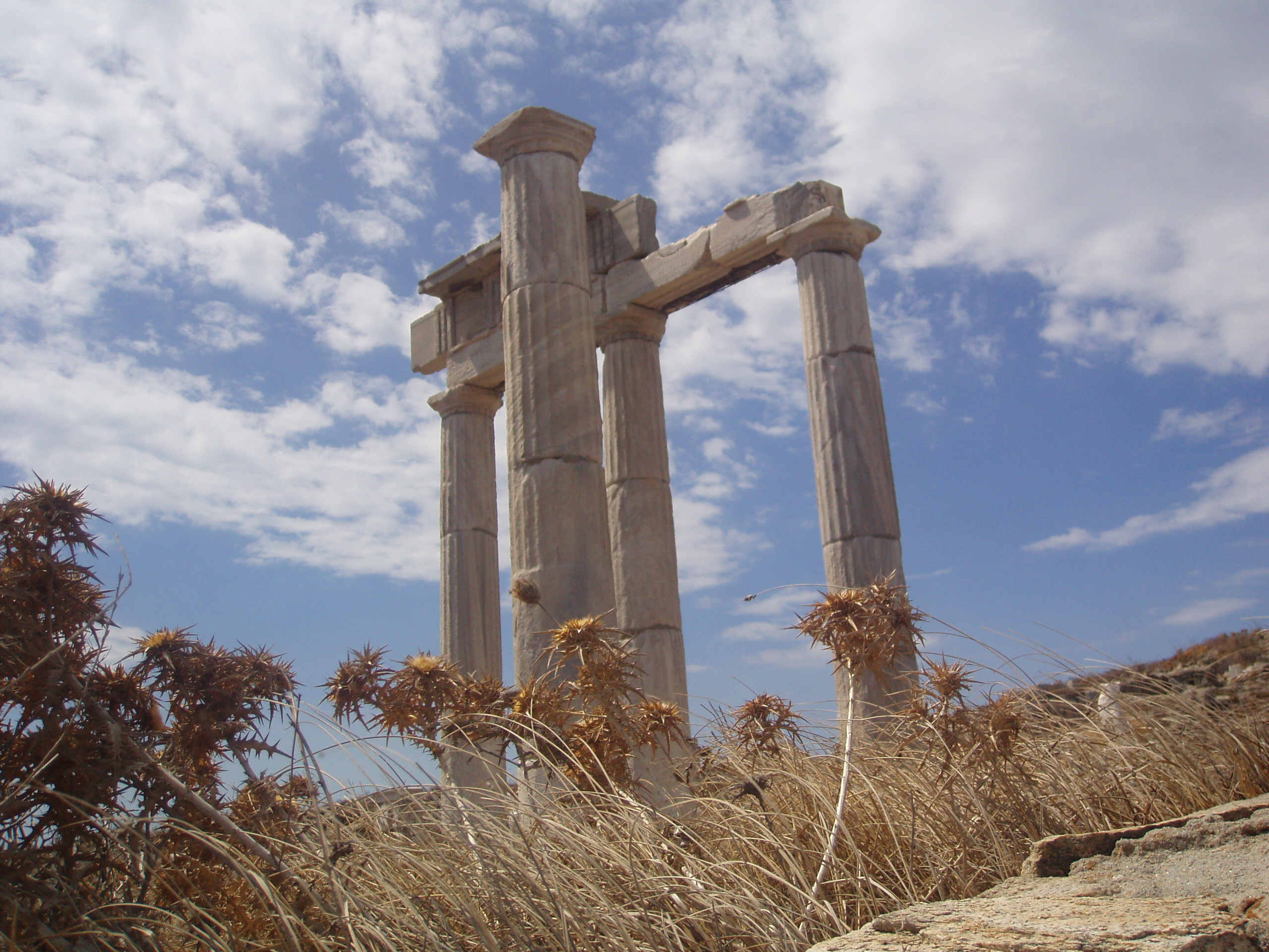 Ruinas en la isla de Delos.